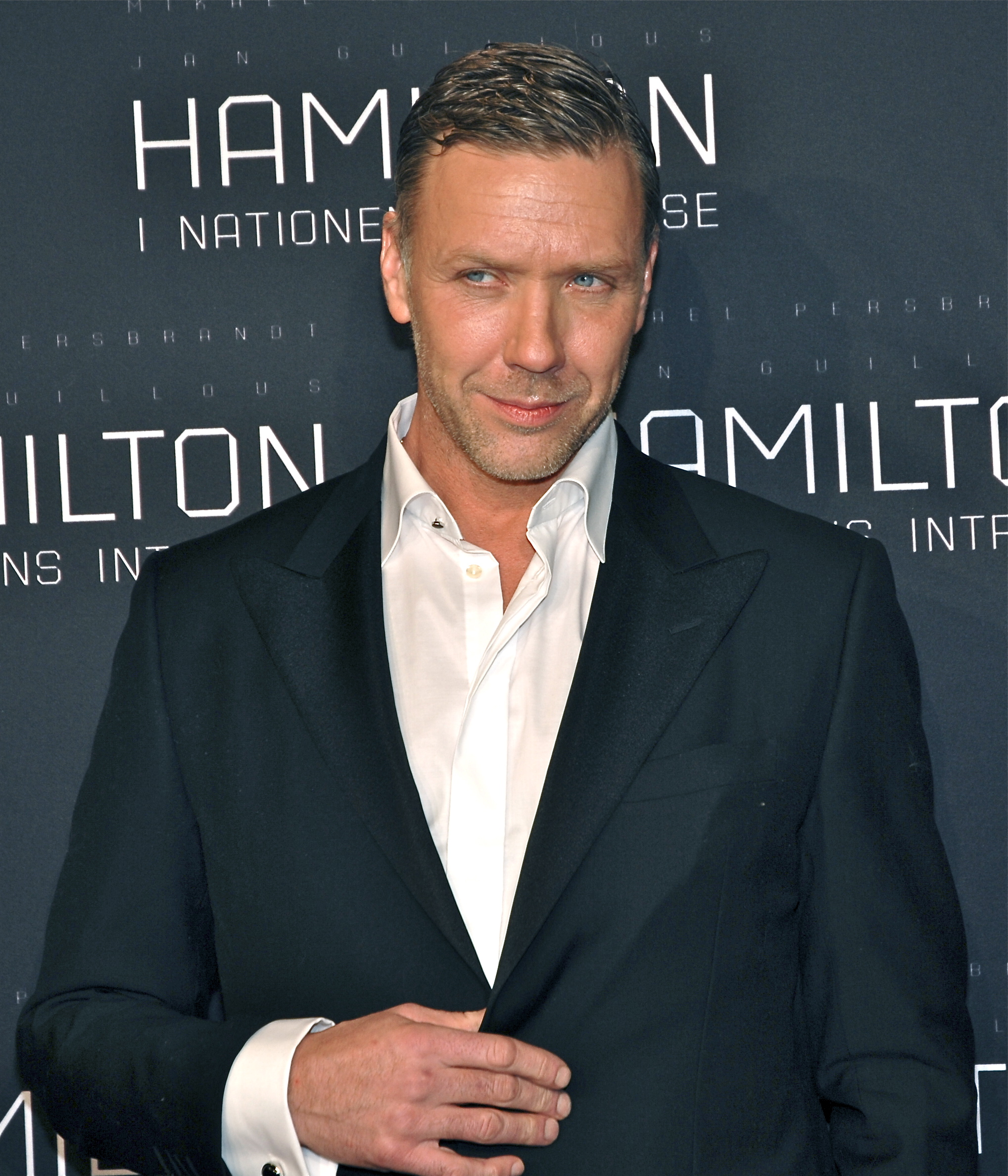 Mikael Persbrandt på galapremiären av Hamilton - I nationens intresse, i Stockholm den 9 januari 2012.